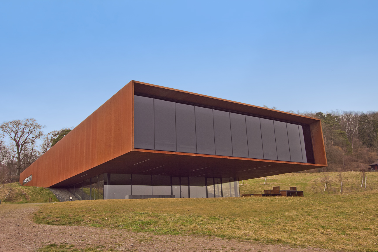 Museumsgebäude der Keltenwelt am Glauberg am Glauberg, Wetteraukreis in Deutschland